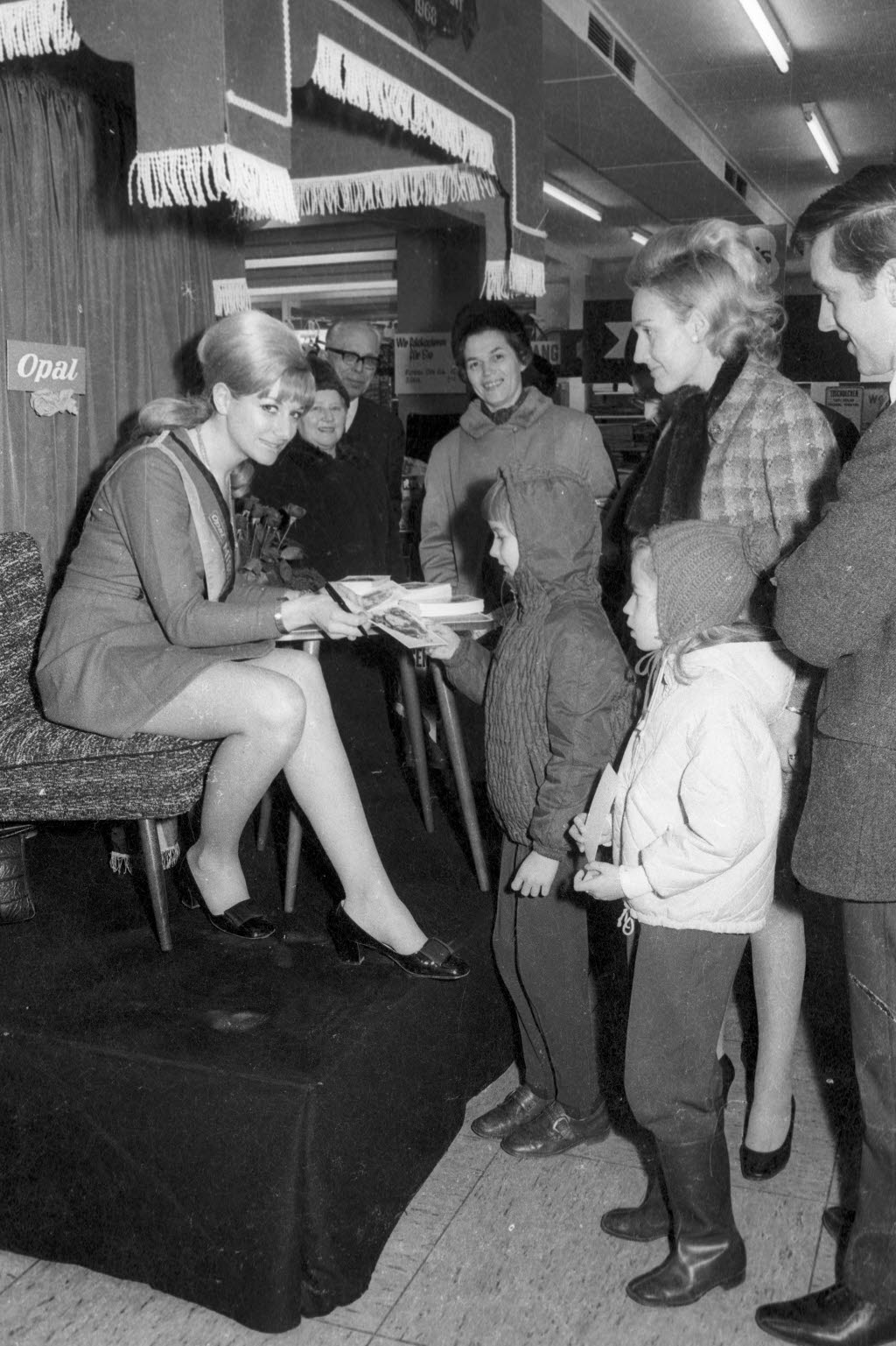 Die Studentin Lilian Atterer im Supermarkt Markmann in der Schönberger Straße.